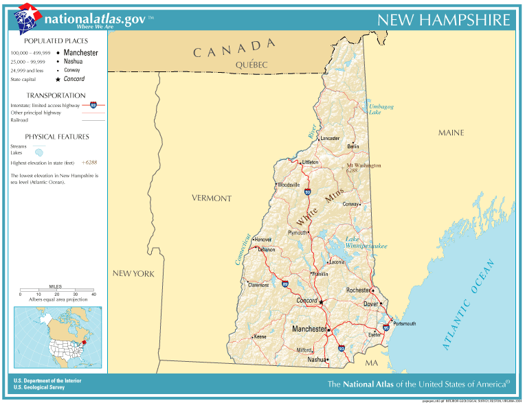 Atlas nacional de Nueva Hampshire